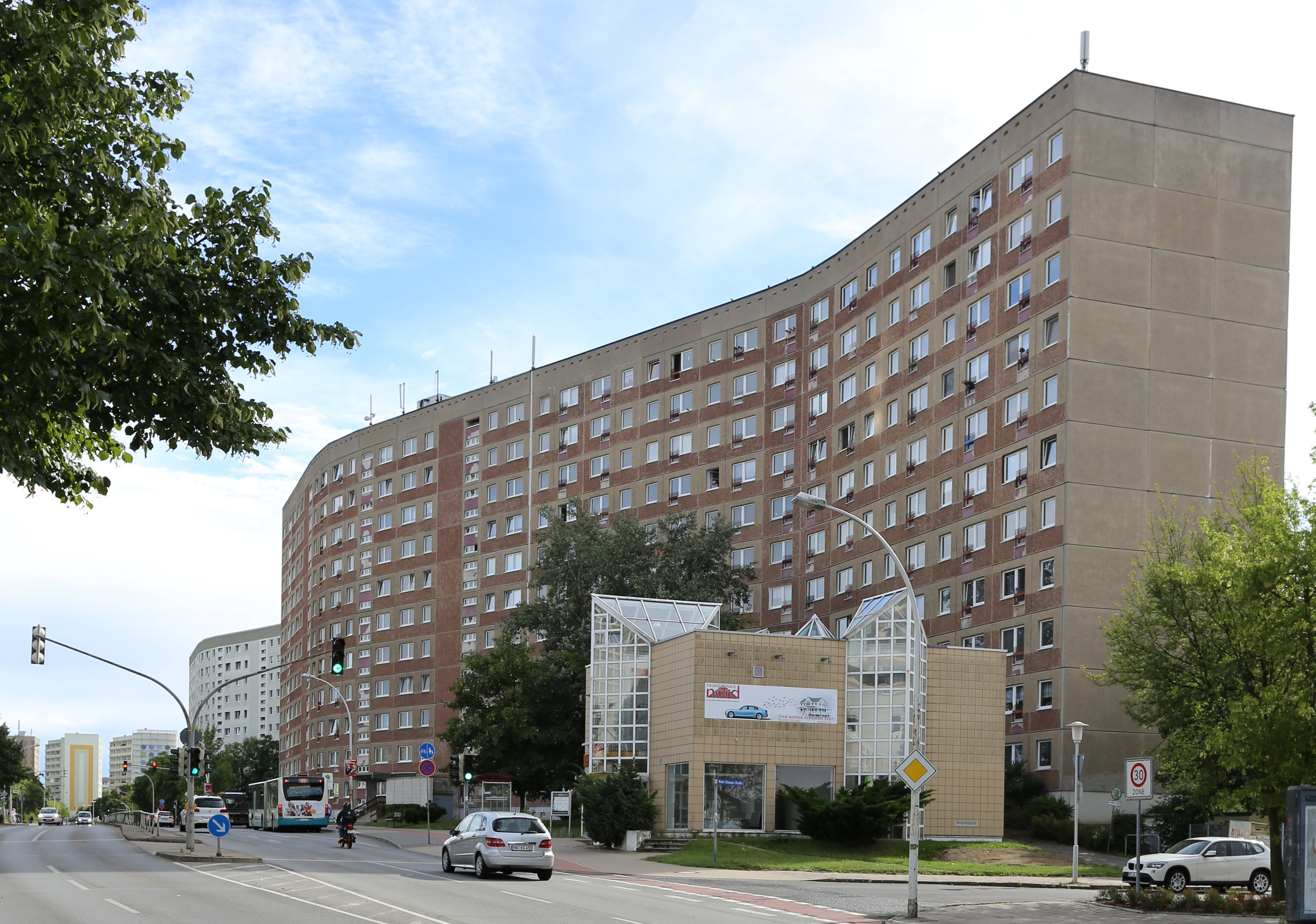 Der Juri-Gagarin-Ring von Norden aus gesehen nach Süden hin mit den die Straße formenden Hochhäusern